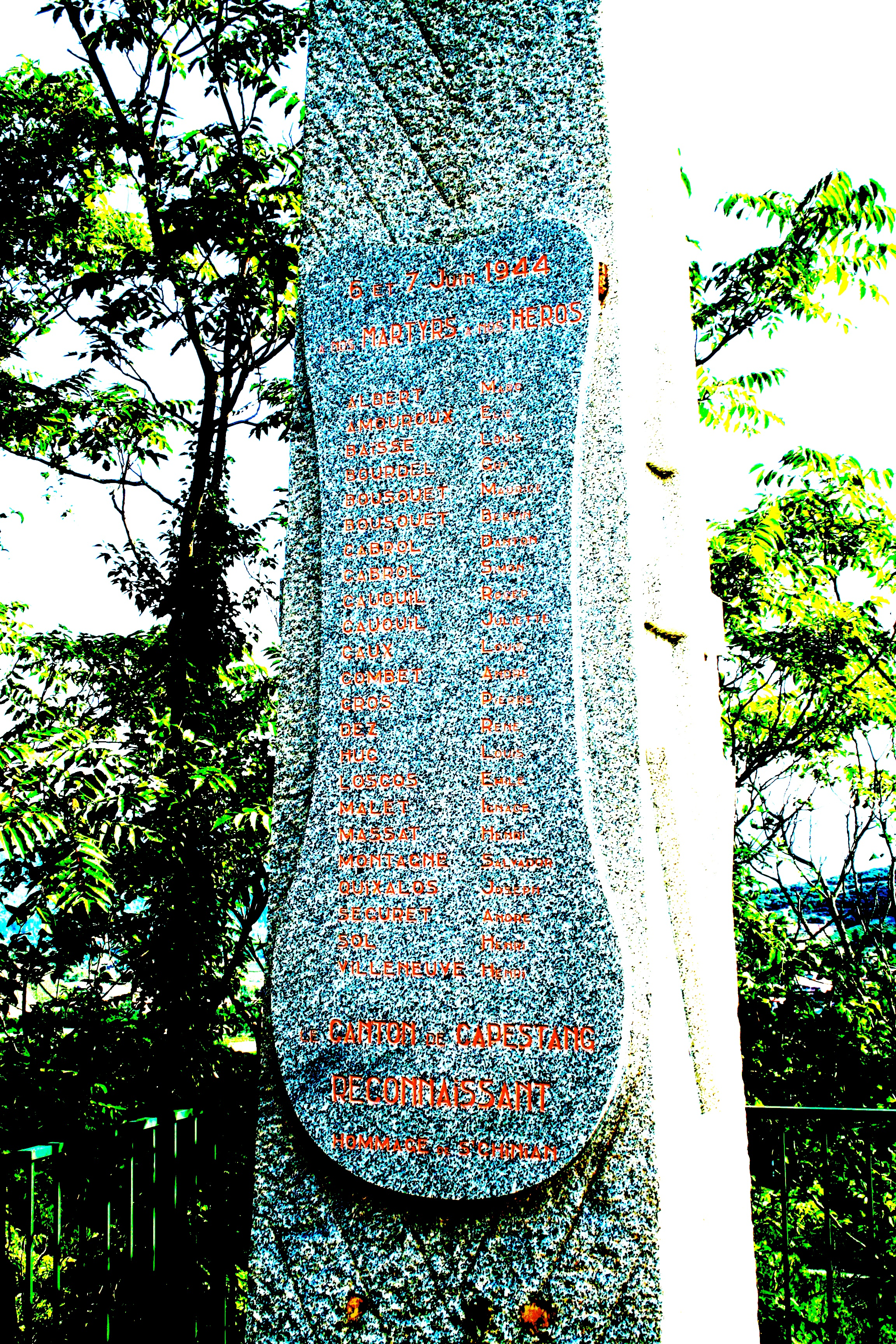 Saint-Chinian (Hérault) - mémorial de la Résistance au col de Fontjun - 6 et 7 June 1944 - liste des noms.